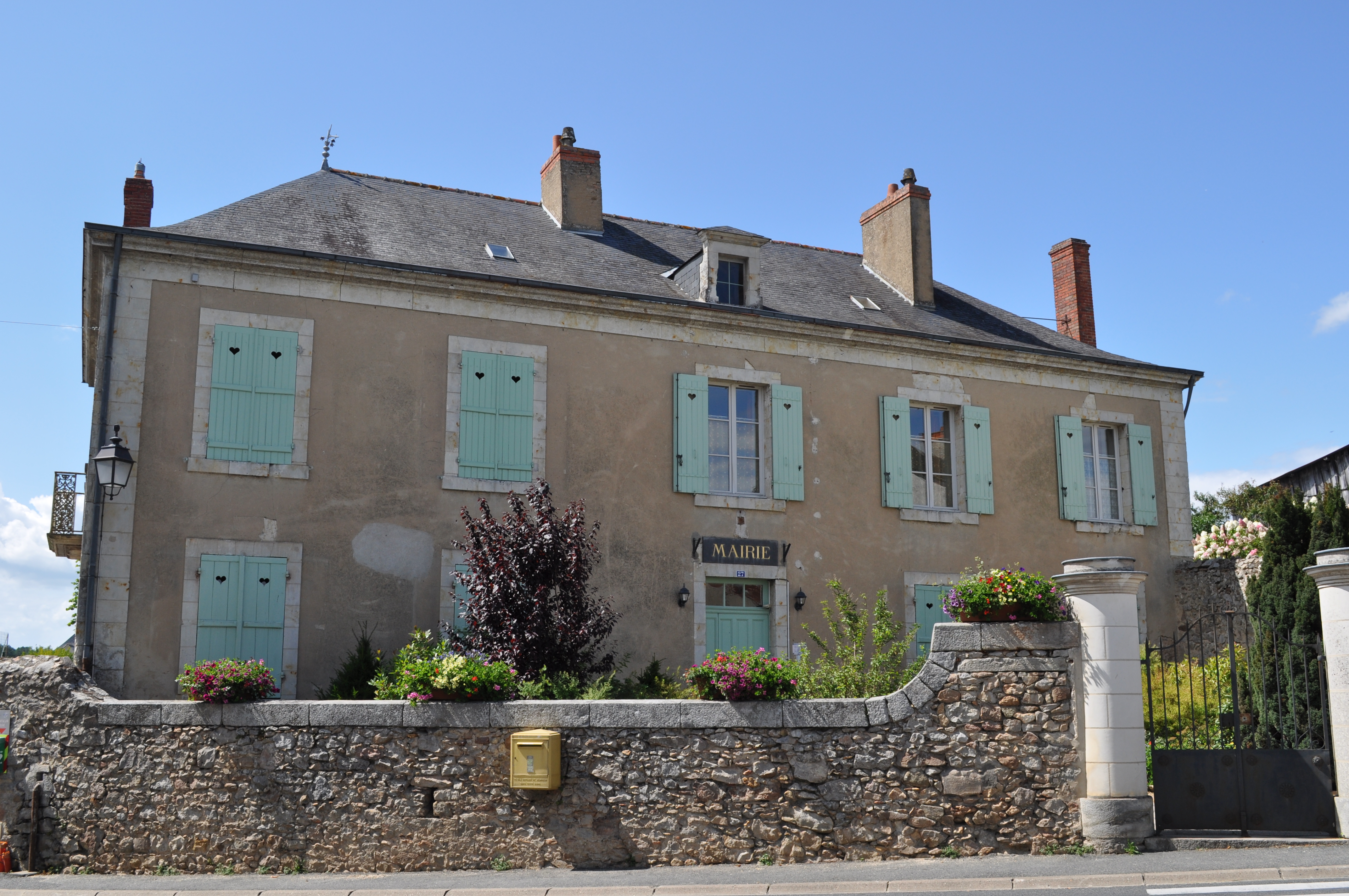 Mairie du Vieil-Baugé (Maine-et-Loire)